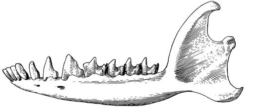 Leptictis dakotensis Leidy, 1868 (F:AM 108194) from the earliest Oligocene of North Dakota’s White River Group, left lateral mandibular drawing (modified from Novacek 1986: fig. 1).